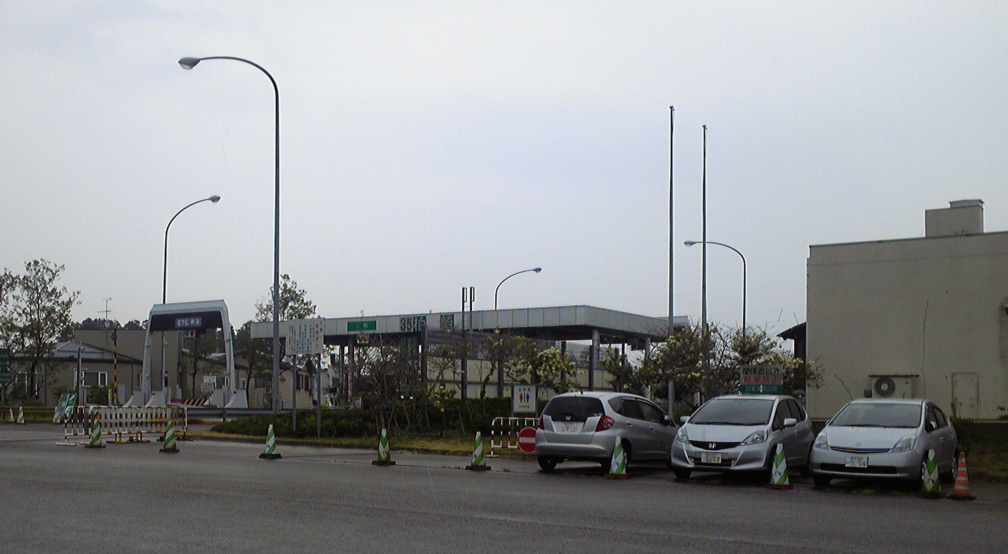 柏崎インターチェンジ